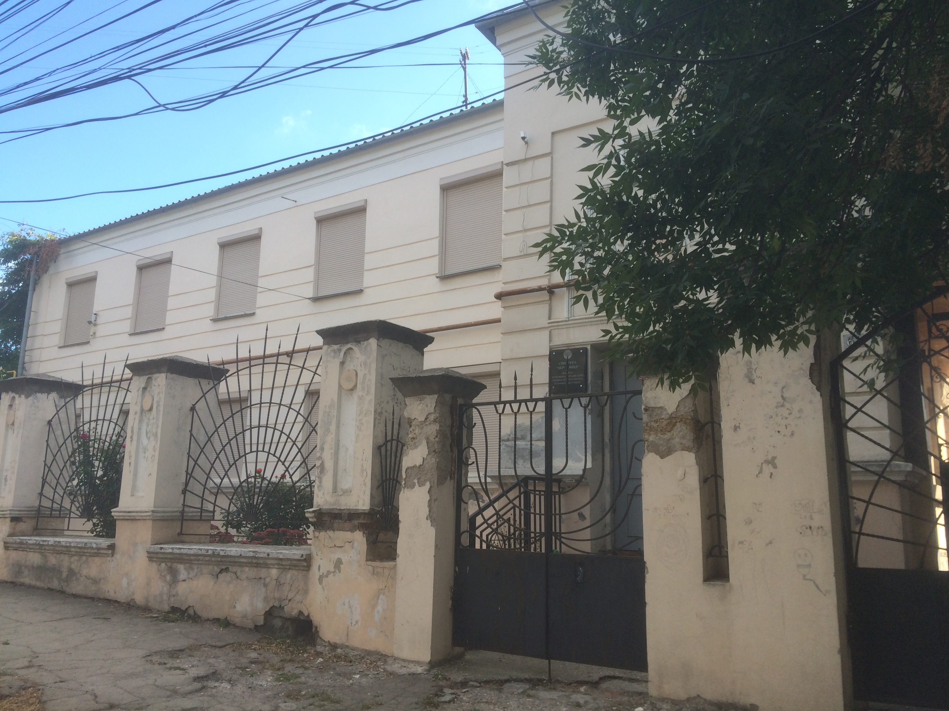 Єврейський молитовний дім «Нер-Томід», Сімферополь, вул. Сергєєва-Ценського, 61